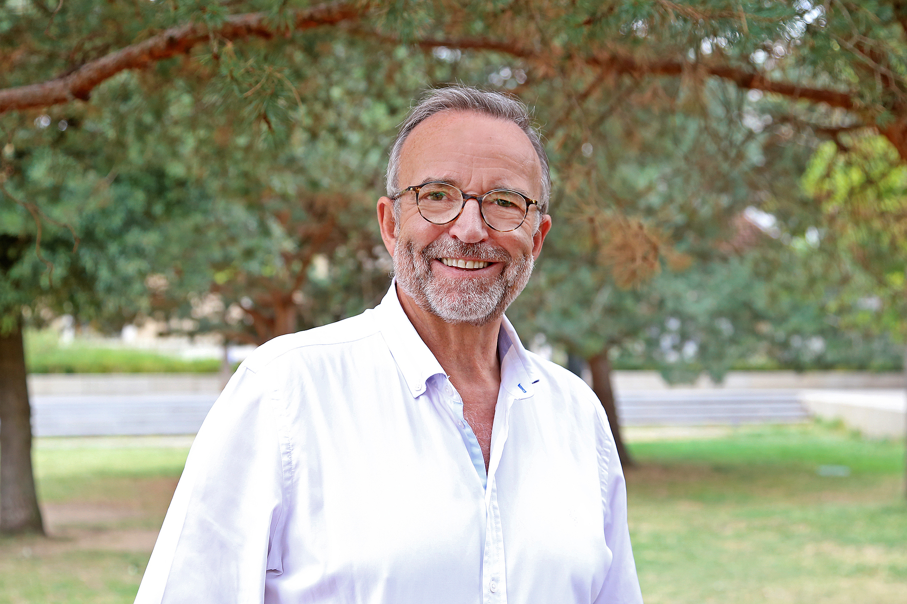 Photo d'Etienne Blanc, Député de l'Ain